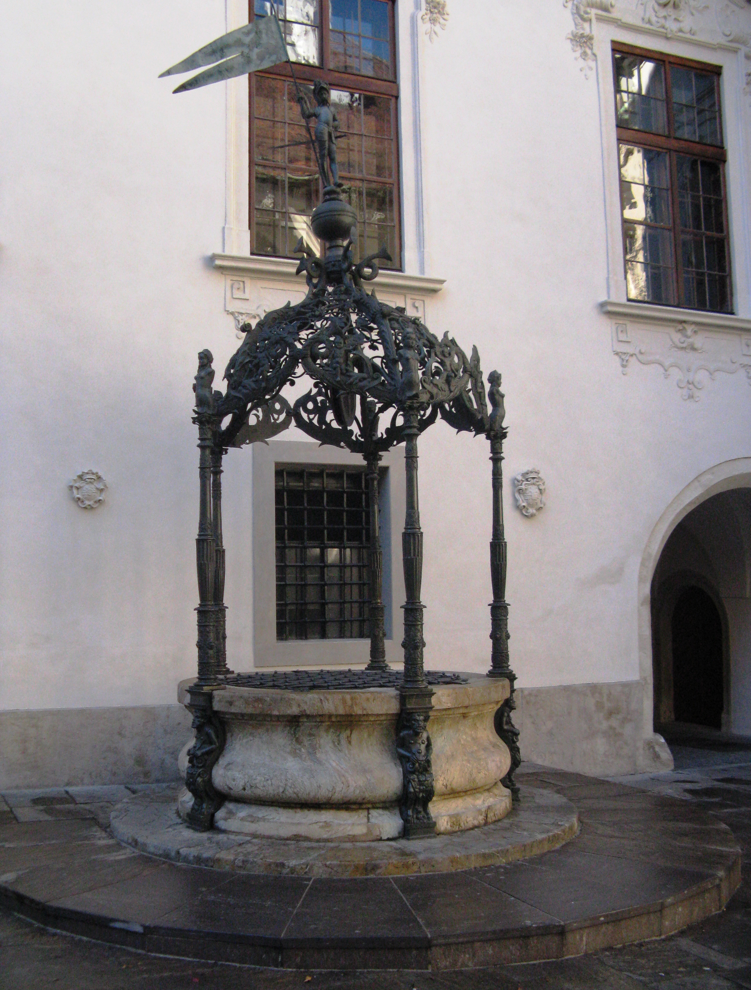 Schmiedeeiserne Brunnenlaube aus 1590 im Grazer Landhaushof